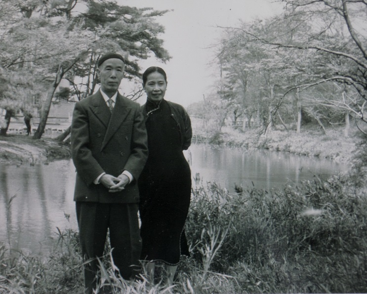 Azabu Garden Tokyo 1960s -- SAM_1418